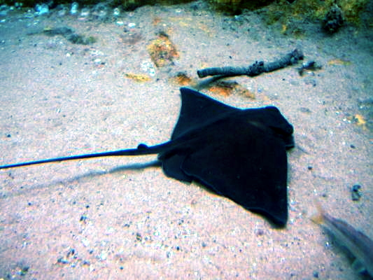 Common eagle ray (Myliobatis aquila) at L'Aquarium Barcelona.